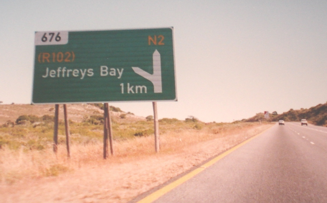 Schild an der Nationalstraße N2 in RSA